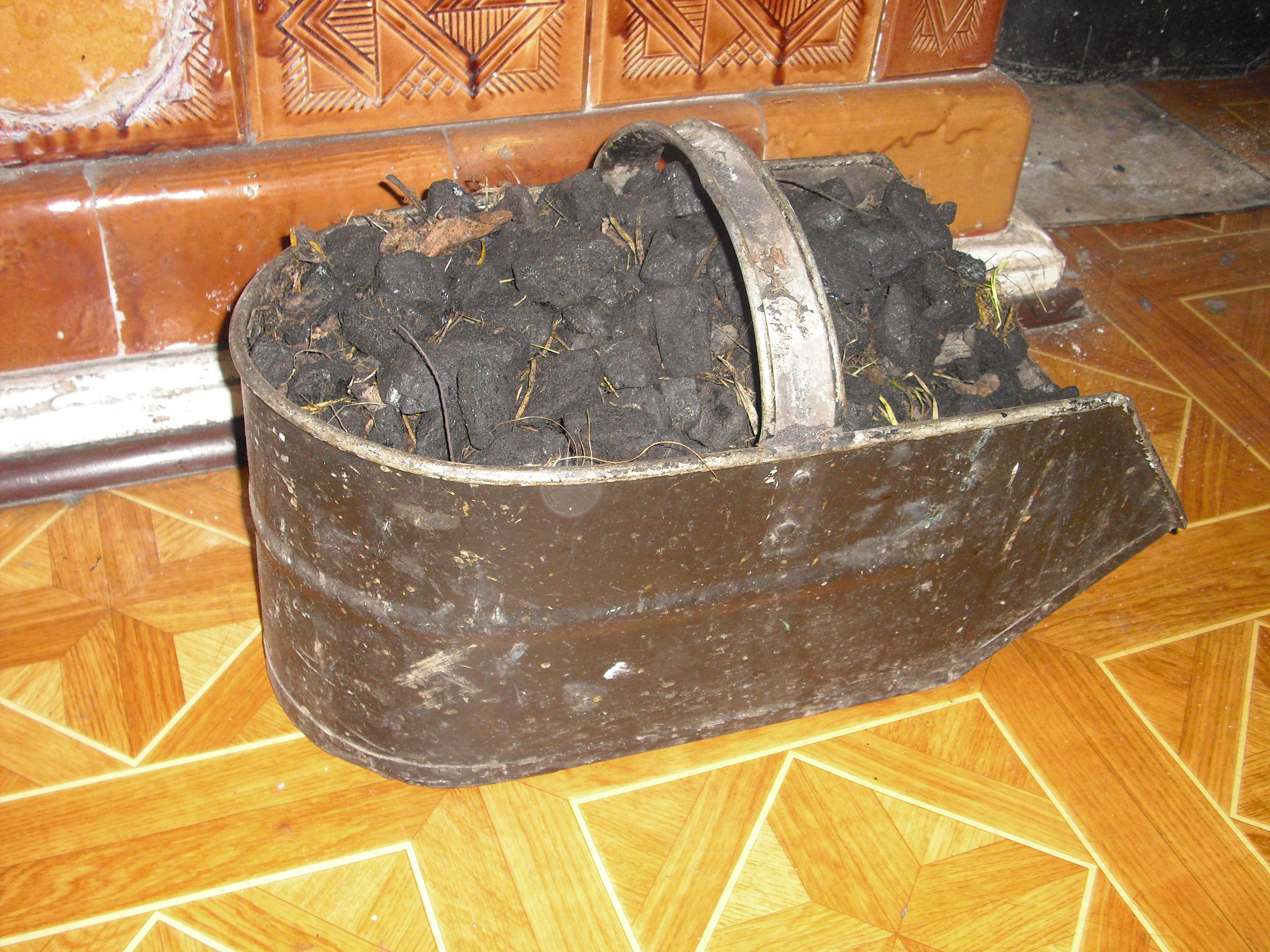 Ślůnski: Koukastla wele kachloka.